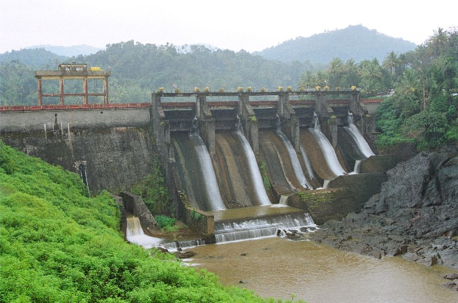 Kallar Kutty Dam